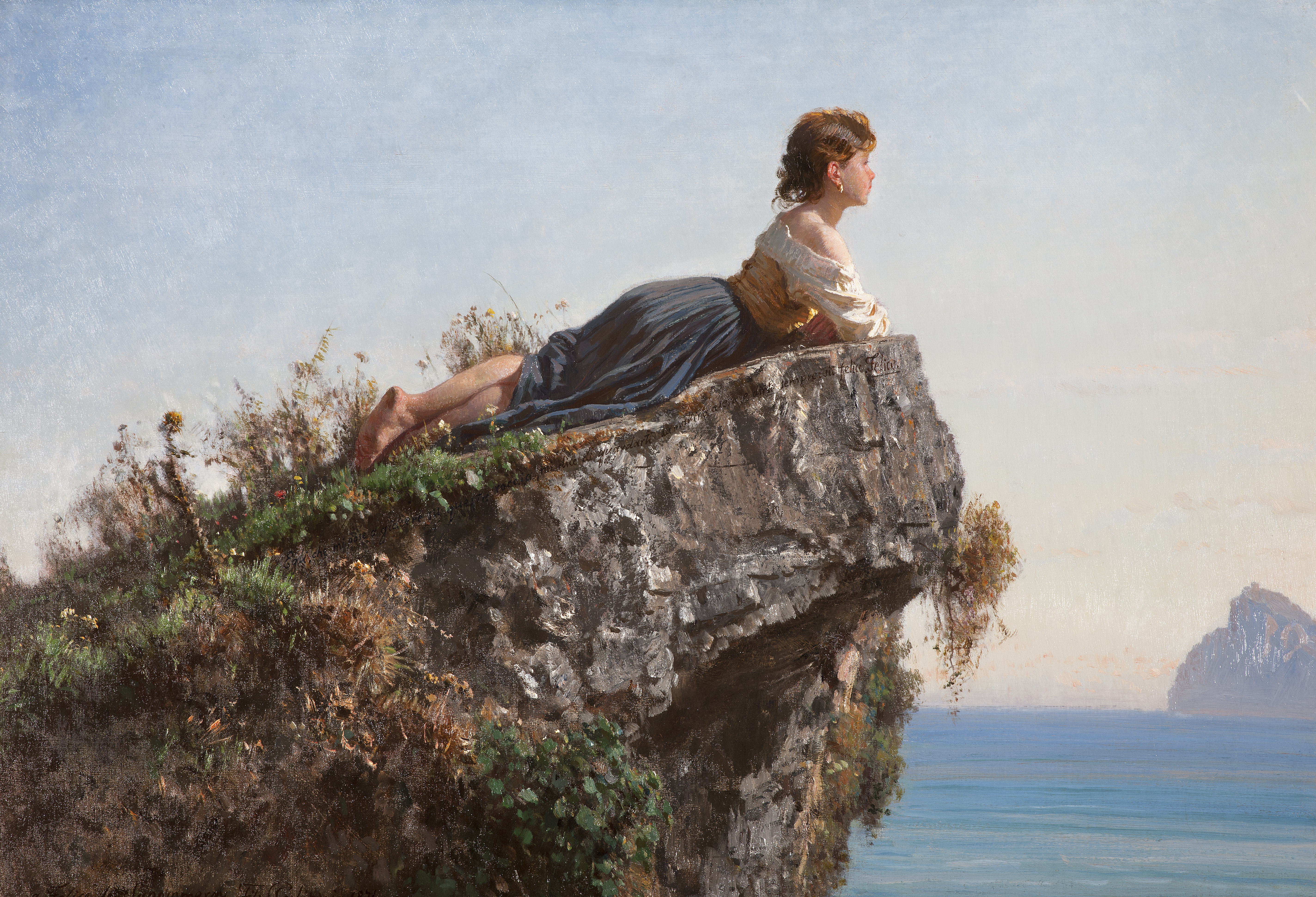 Lungo il profilo della roccia, l’artista ha tracciato con il pennello questa strana epigrafe: "Egli mi pose a giacere su questa roccia, mi dice di guardarti da mattina a sera e dirti sempre: sii felice. Felice."